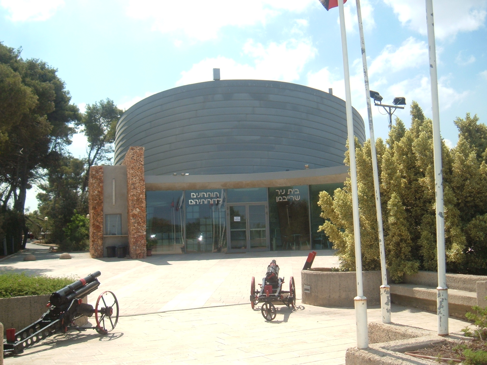 "Beyt Hatotchan" (Gunner's house) in Zichron-Yaakov, Israel